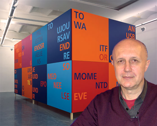 Portrait de Philippe Cazal